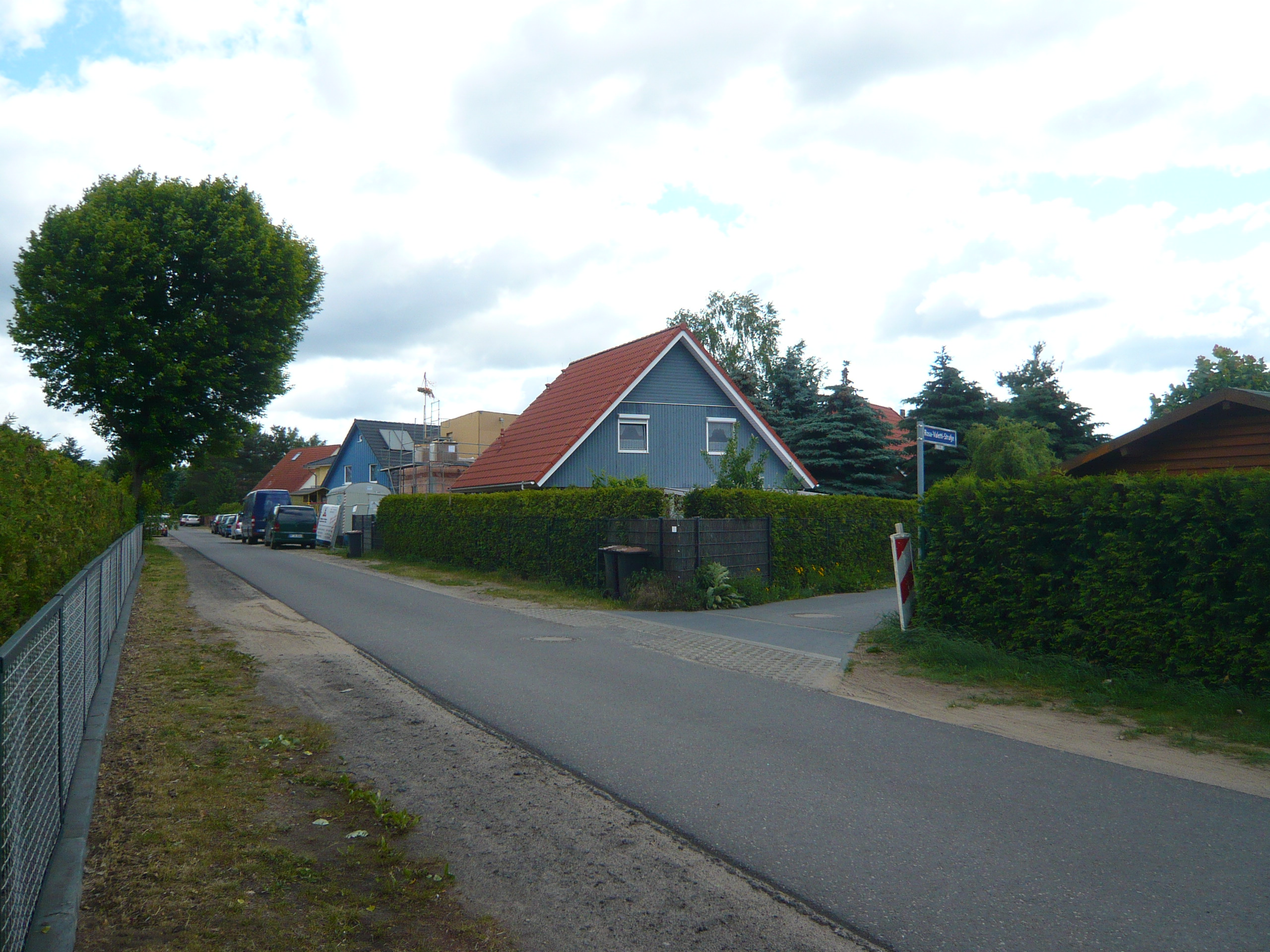 Berlin-Mahlsdorf, Rosa-Valetti-Str.